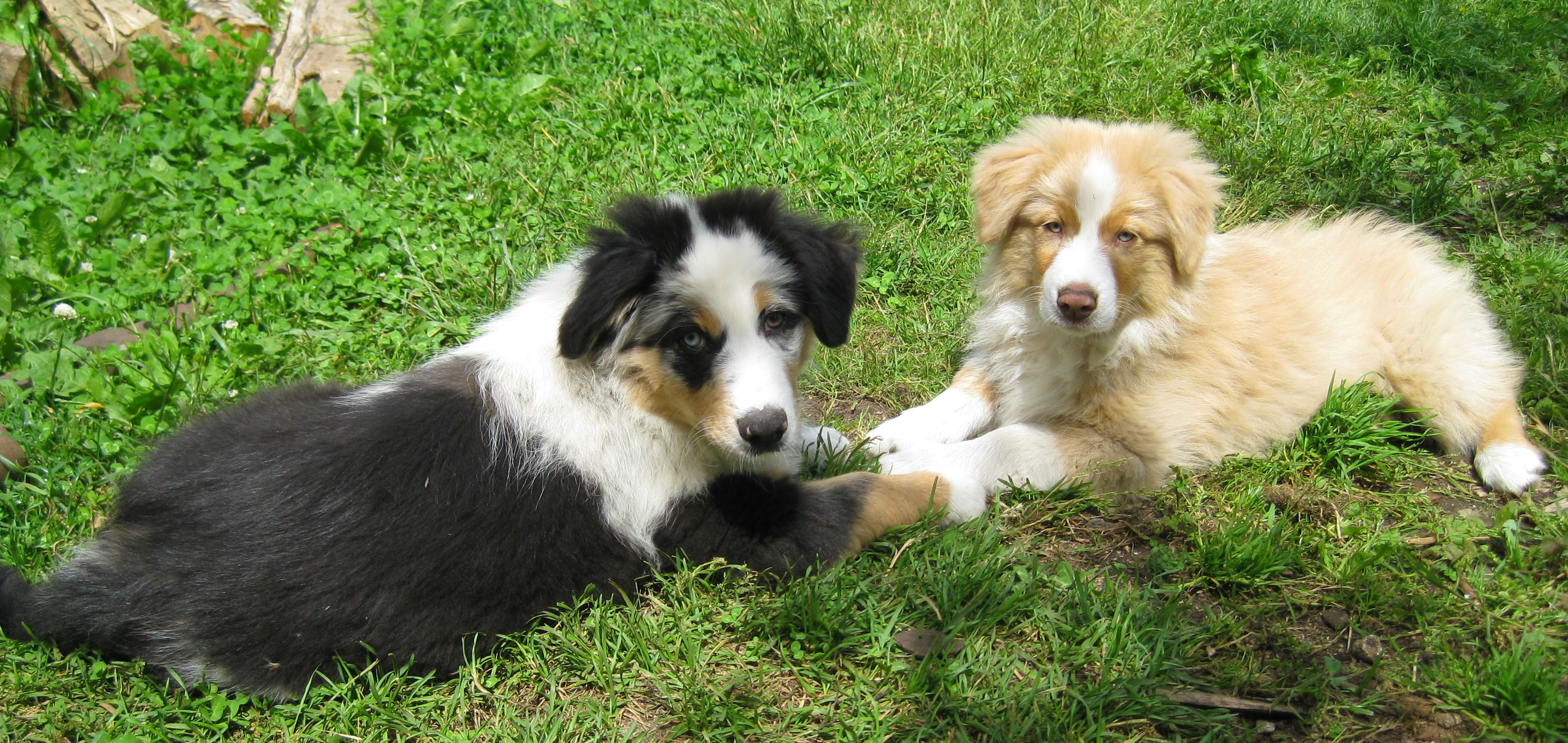 Bergers australiens, chiots de 2 mois.